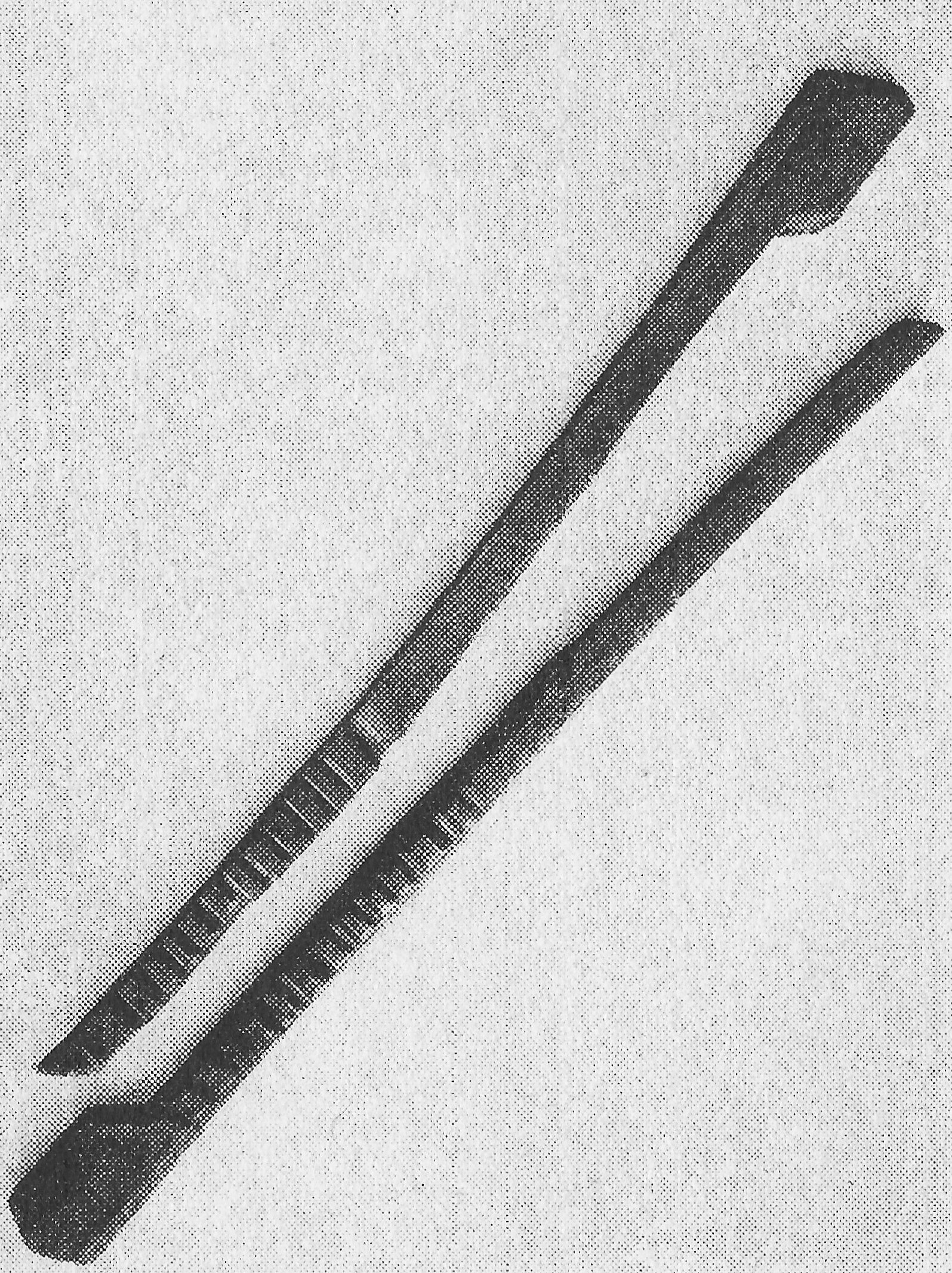 Kerbhölzer (Schloßmuseum Zerbst; Anhaltisches Landesmuseum), 1935 oder früher, Das Bild wurde 1935 im Buch von Eduard Stegmann, Aus dem Volks- und Brauchtum Magdeburgs und der Börde, Magdeburger Kultur- und Wirtschaftsleben Nr. 4, Herausgegeben von der Stadt Magdeburg, Seite 46 veröffentlicht.